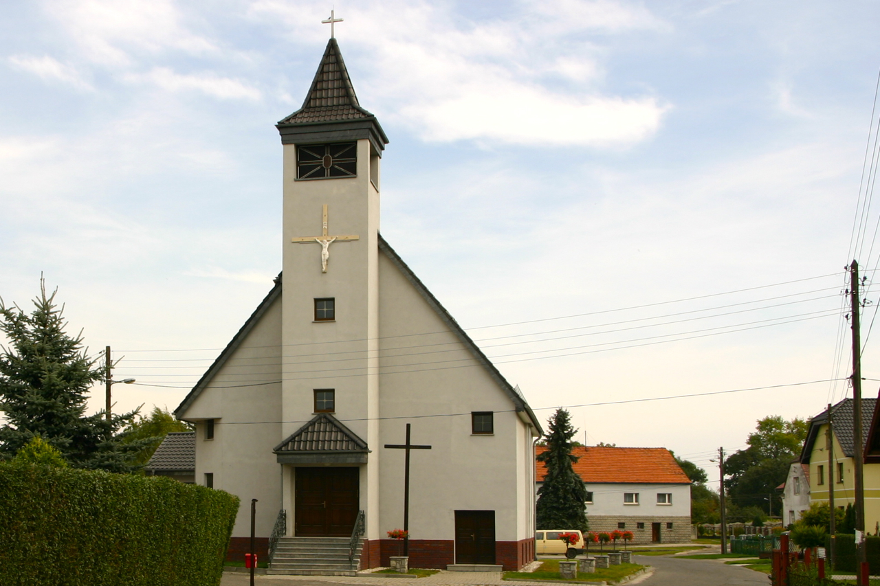 Krobusz (dodatkowa nazwa w j. niem. Krobusch – wieś w Polsce położona w województwie opolskim, w powiecie prudnickim, w gminie Biała.